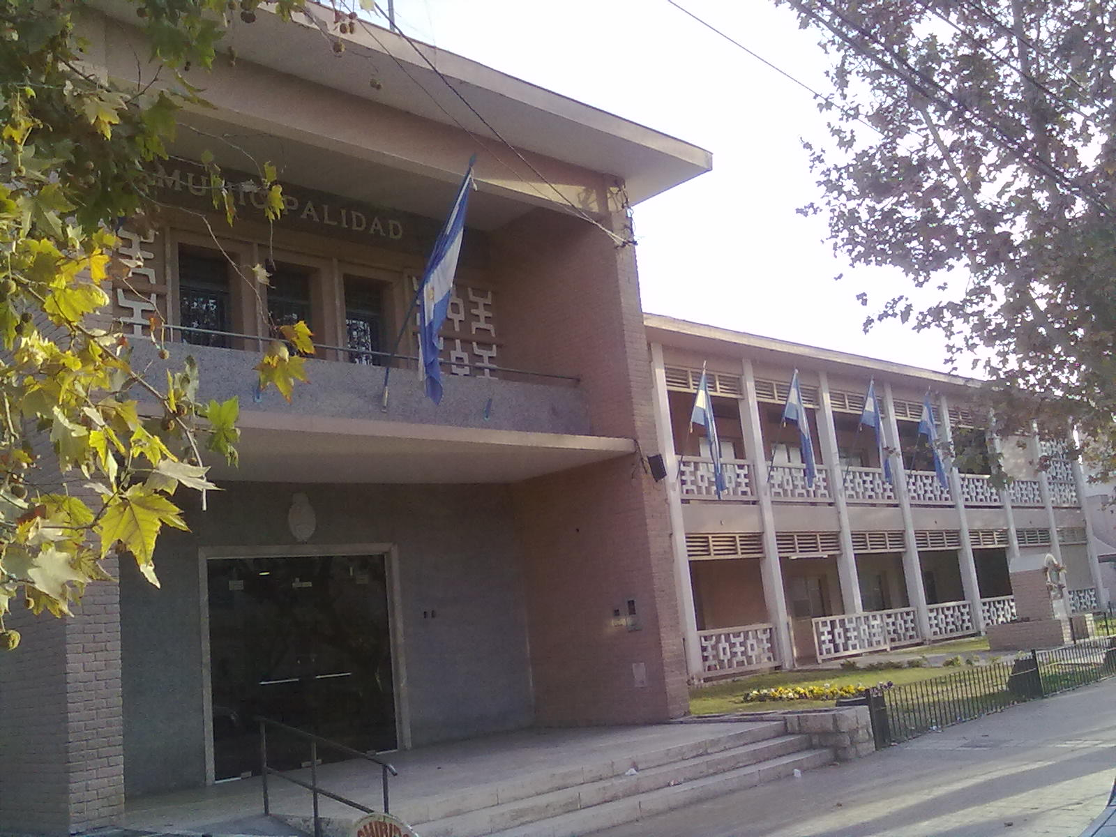 la municipalidad departamental en krausse